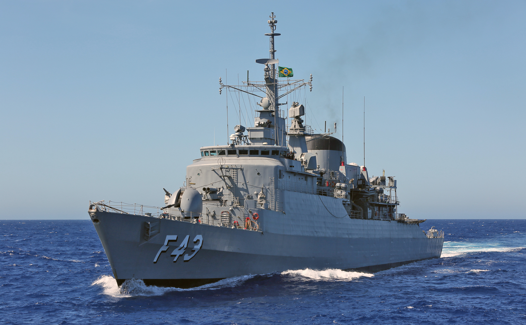 Arquivo liberado pela Marinha do Brasil através de projeto GLAM com Wiki Educação Brasil